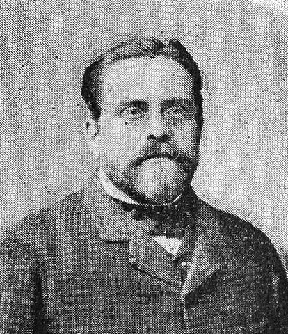 "Chauvière (Emmanuel-Jean-Jules)".